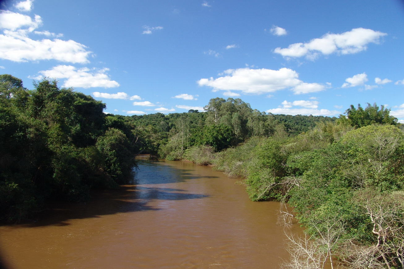 Vistas do município de Santa Cruz do Rio Pardo, estado de São Paulo, Brasil.